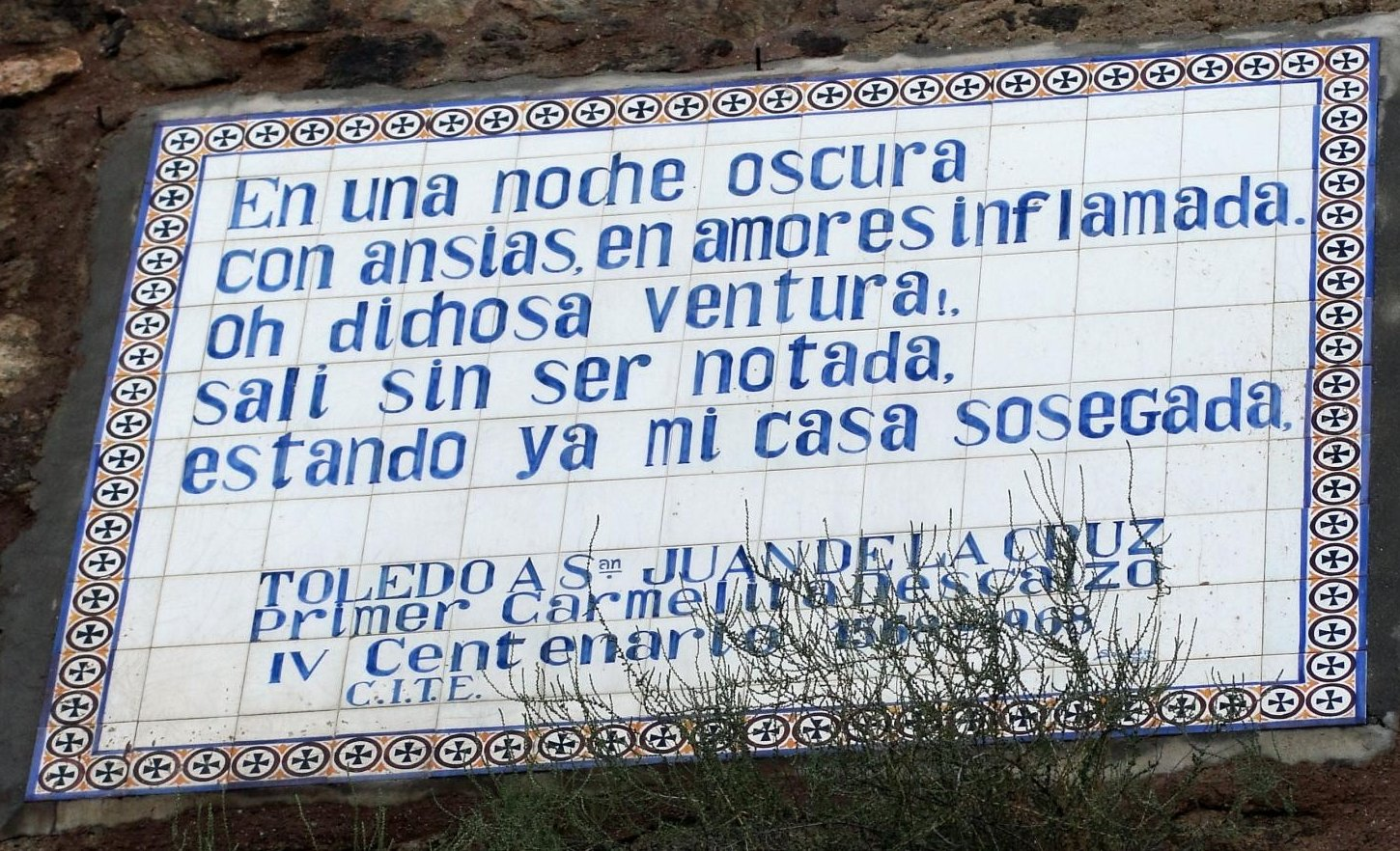 Placa que recuerda a San Juan de la Cruz en el lugar donde estuvo preso, en los restos del convento del Carmen. Toledo, España.